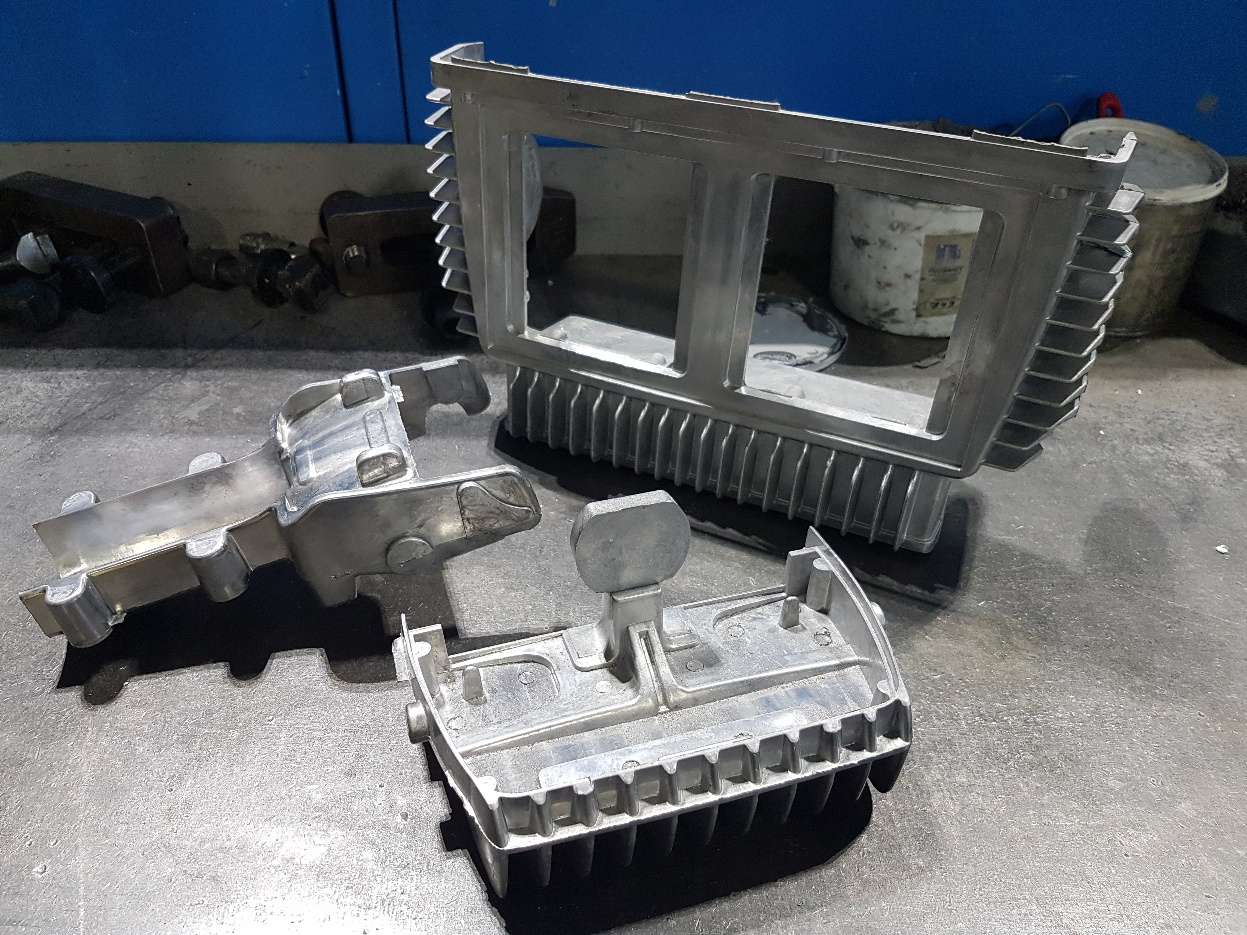 Отливки из алюминия